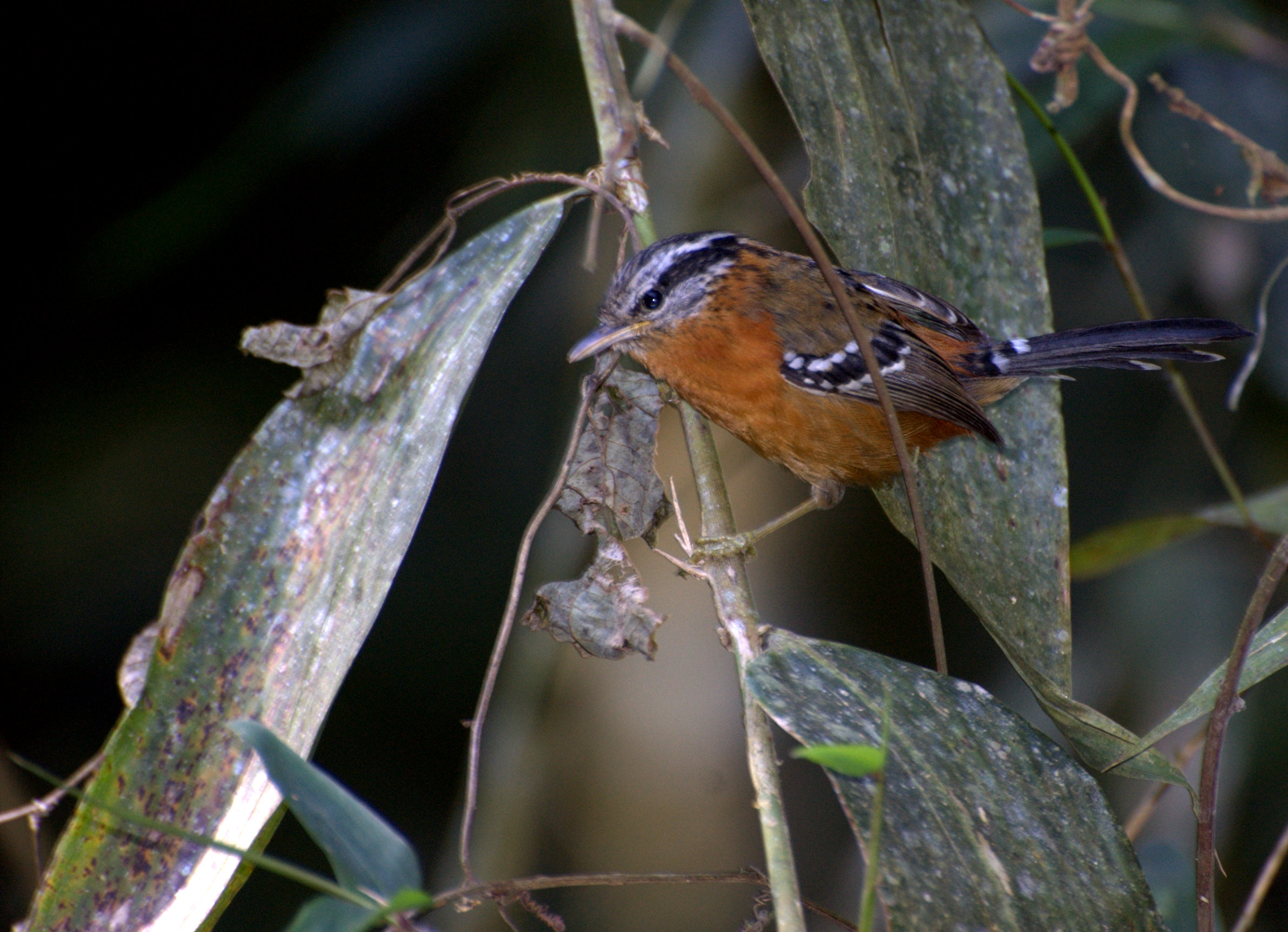 Ferruginous Antbird (Drymophila ferruginea) Parque Estadual da Serra da Cantareira - São Paulo - Capital